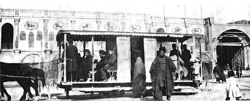 Tehran, Iran